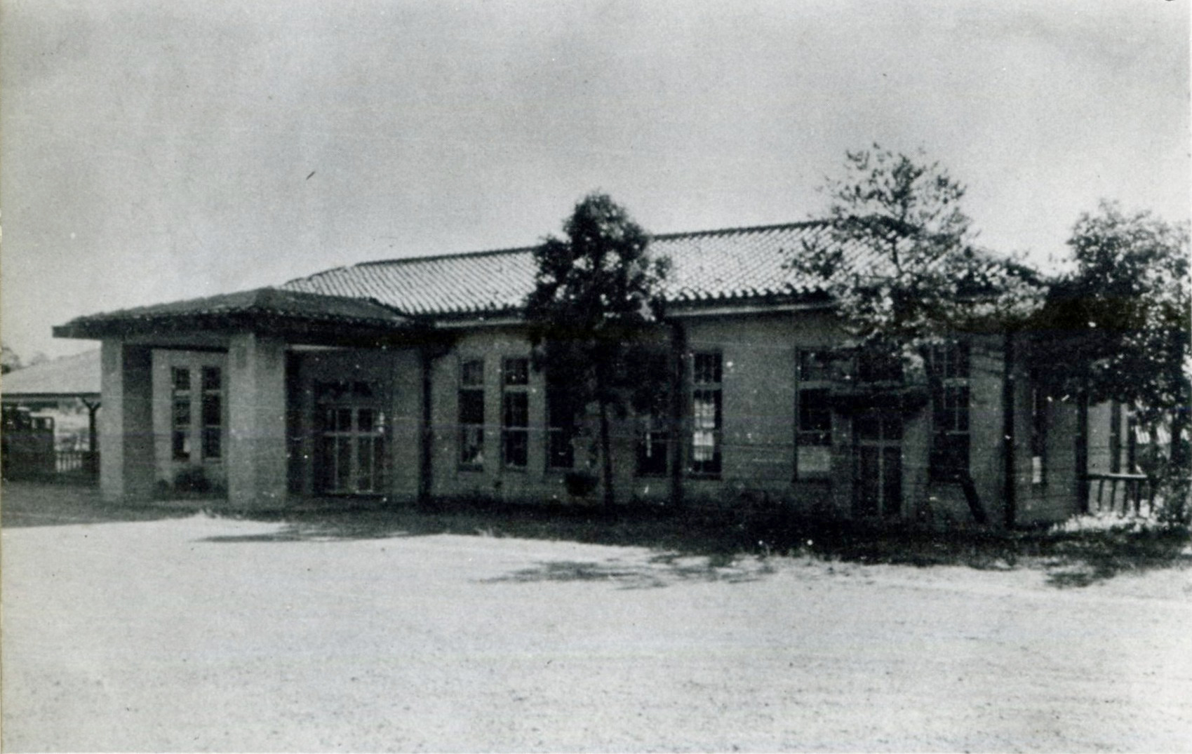 昭和3年頃の桃山駅。以下の絵葉書では木が無い。